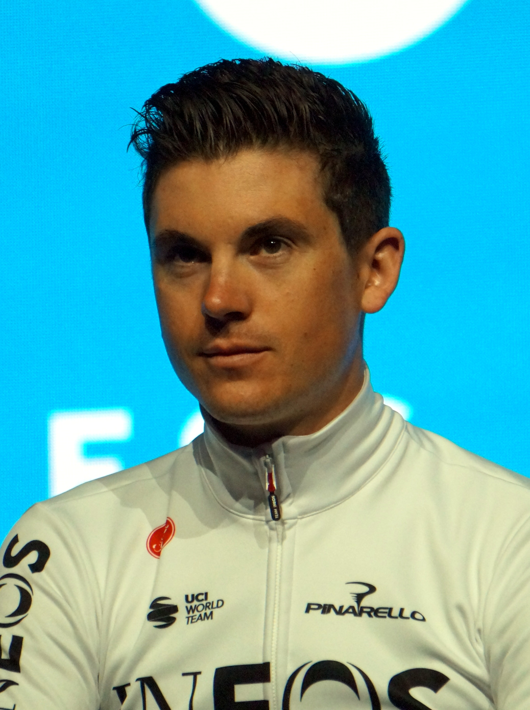 Ben Swift bij de ploegenvoorstelling in Gent voor de Omloop Het Nieuwsblad 2020